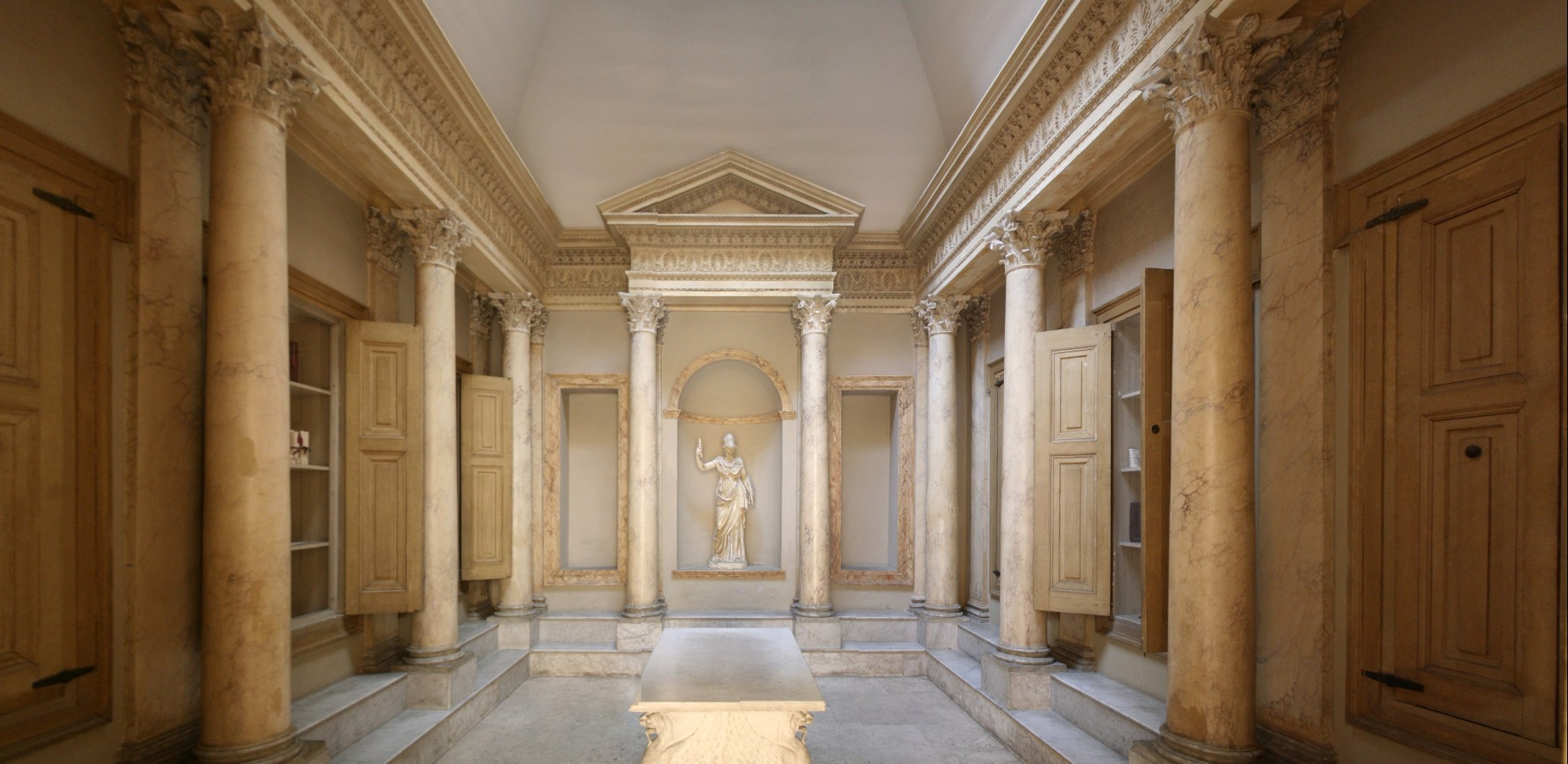 Reconstitution de l'intérieur d'une bibliothèque, Rome antique.